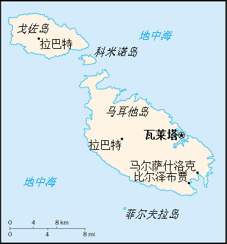 马耳他地图，显示岛名和城镇名。